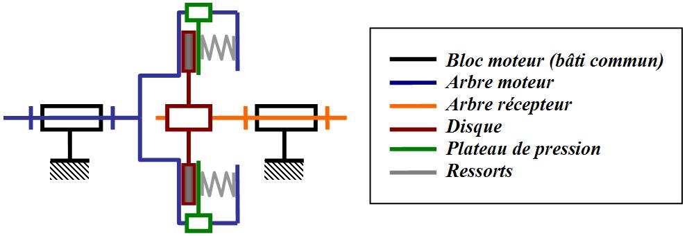 Schéma technologique décrivant le principe de transmission d'un embrayage. La commande de débrayage n'est pas représentée.